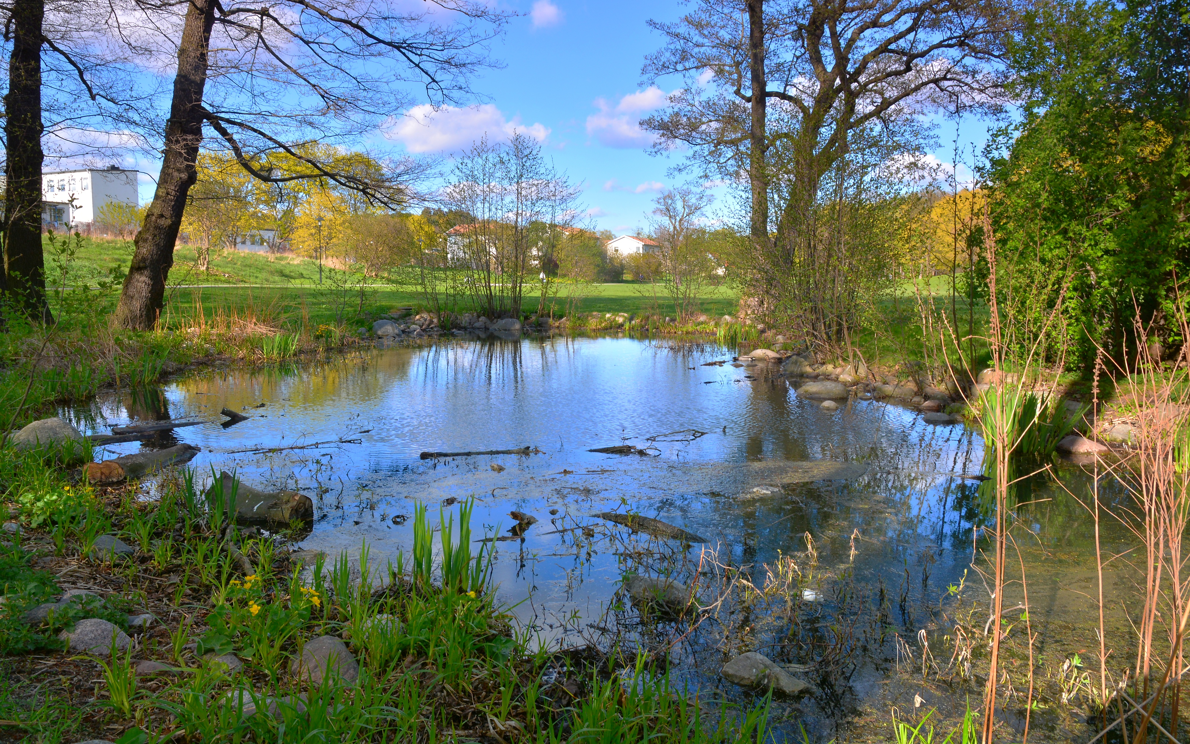 Storängsparken i Årsta, södra Stockholm.